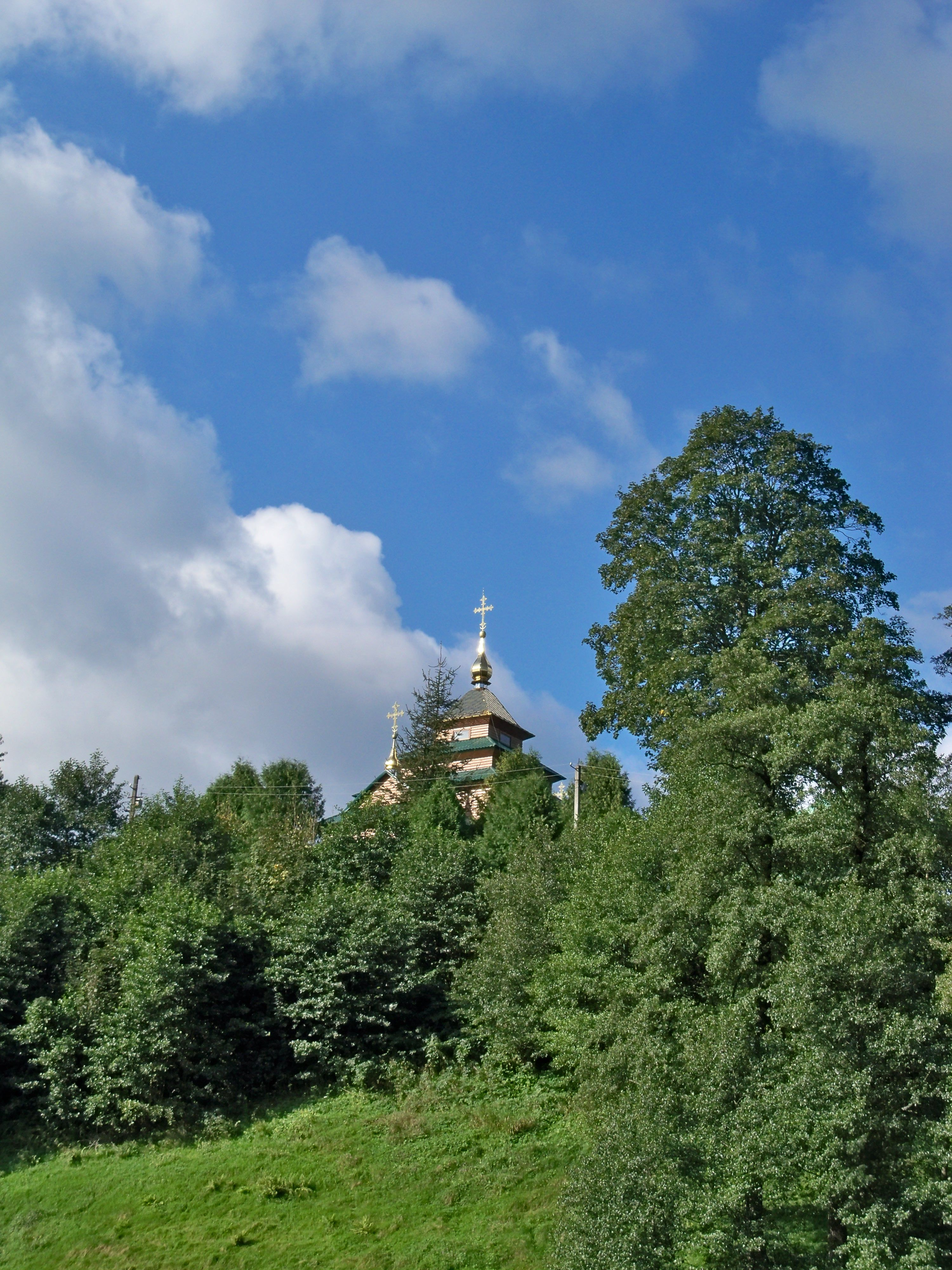 Городище давньоруське, смт. Верхнє Синьовидне, ур. Золота гора